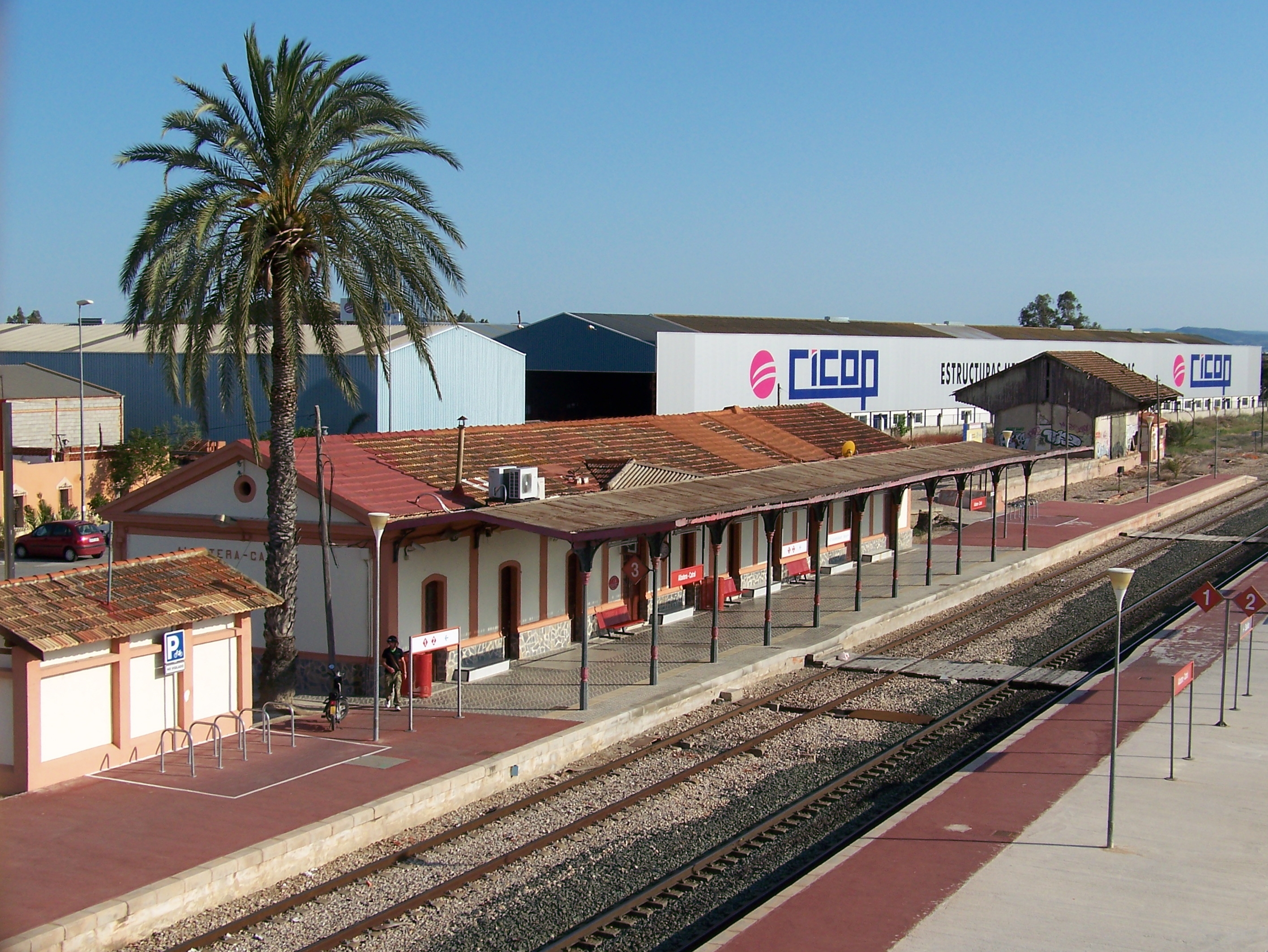 La antigua estación de Albatera-Catral (Alicante, España), que, en realidad, se encuentra en el casco urbano de San Isidro, pues cuando se creó San Isidro no existía como tal y el pueblo era solo una pedanía de Albatera y se llamaba San Isidro de Albatera. Fue arrasada para dejar paso a las vías del AVE Alicante-Murcia en verano del 2011.